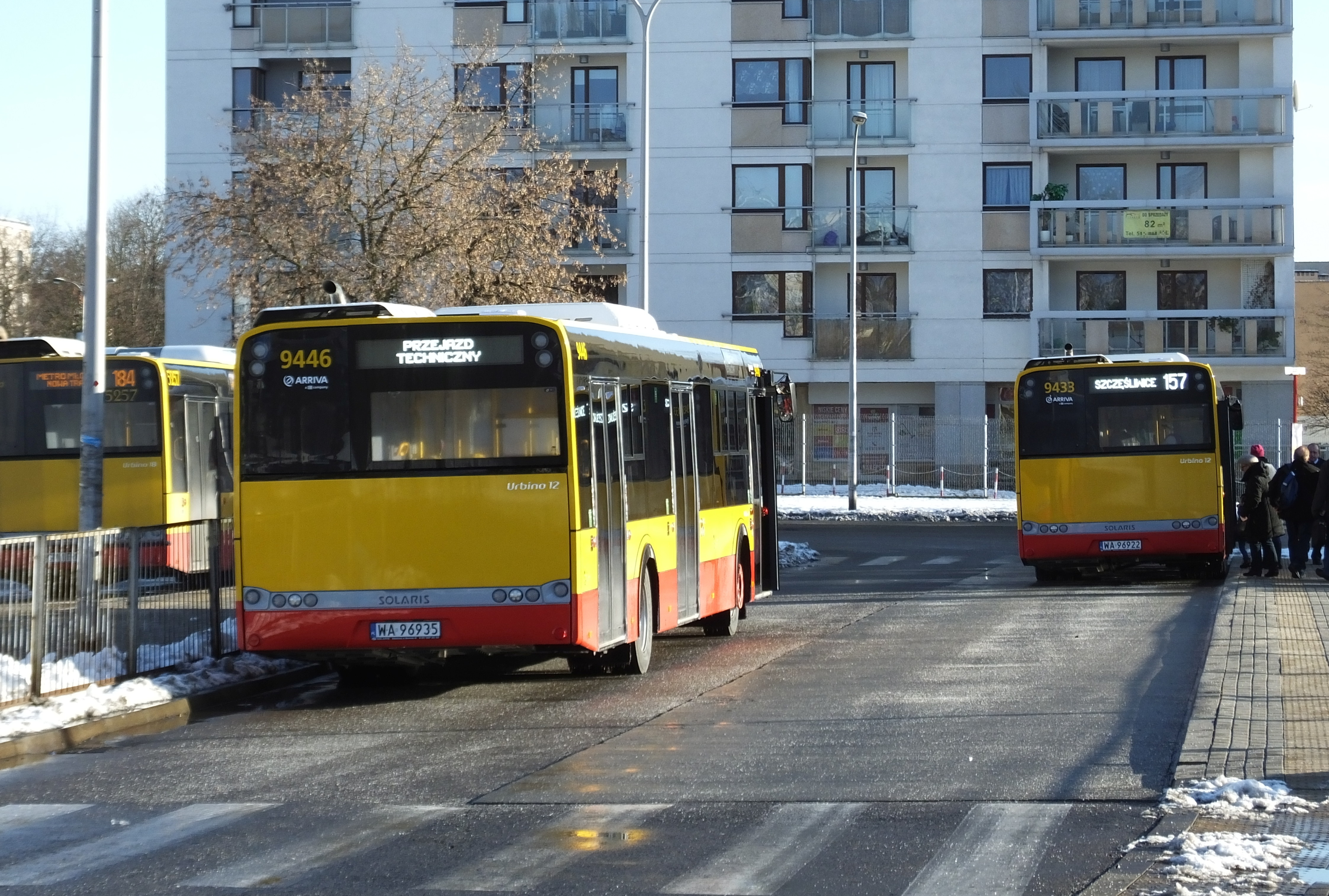 Jedne z pierwszych warszawskich autobusów Solaris z czarno-białymi wyświetlaczami